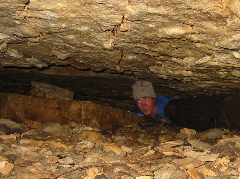 Virulase koopa sisemus